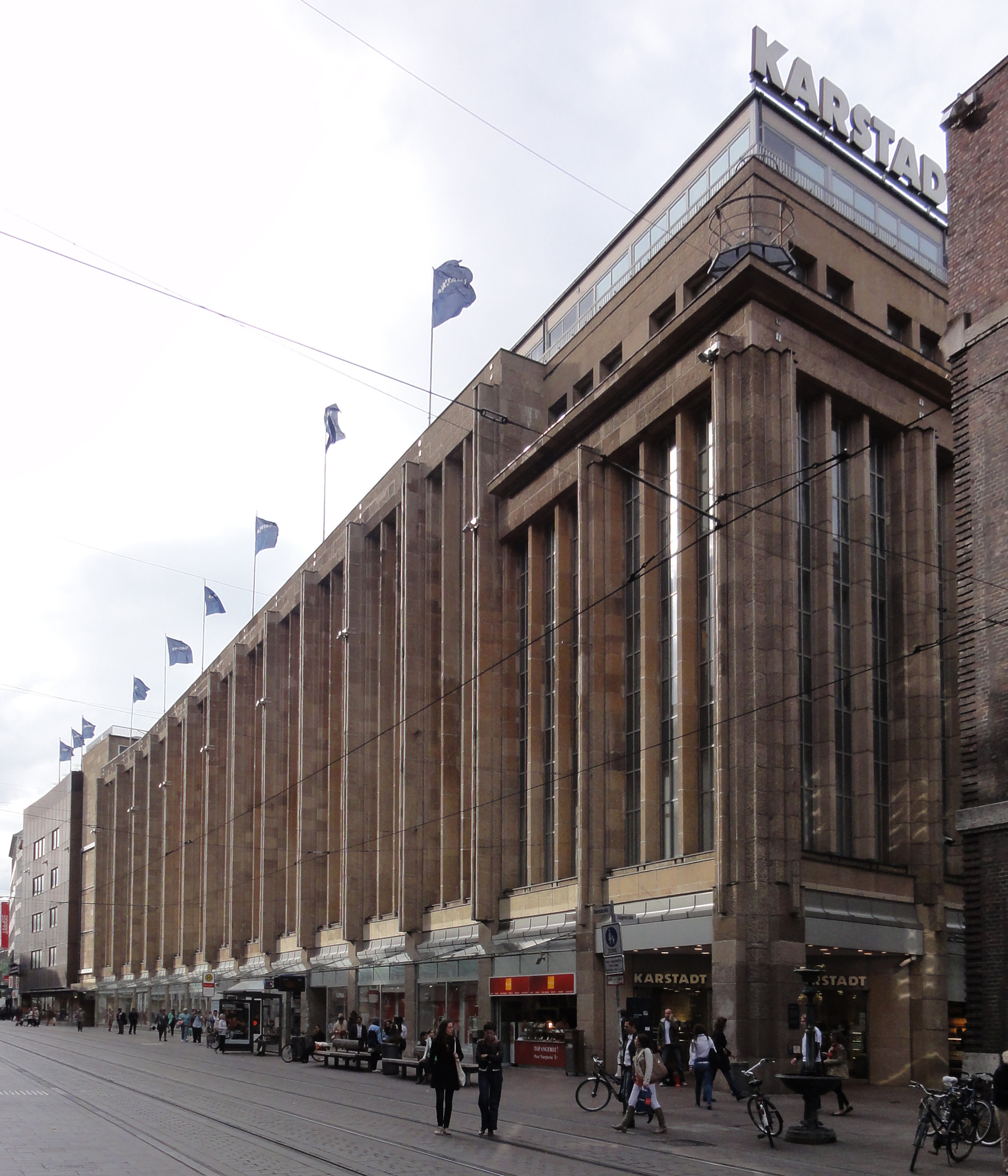 Karstadt Warenhaus in Bremen, Obernstraße 5Das abgebildete Objekt ist ein geschütztes Kulturdenkmal in der Freien Hansestadt Bremen, mit der Nr. 1887 beim Landesamt für Denkmalpflege registriert.